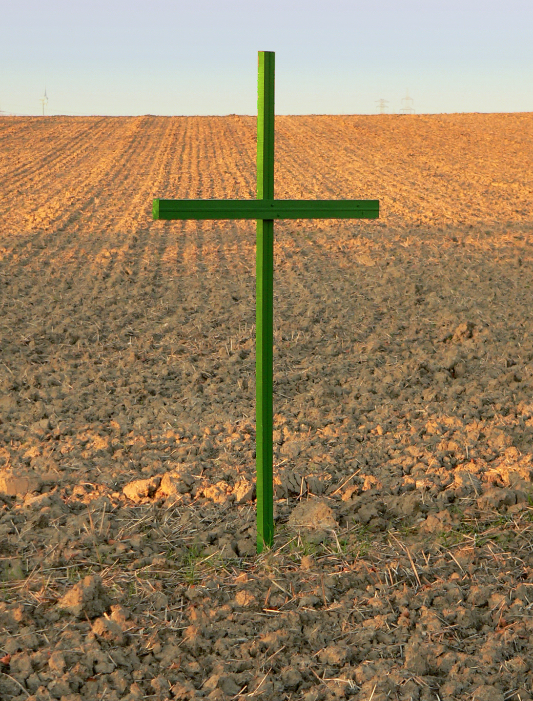 Grünes Kreuz auf einem Acker in der Region Hannover